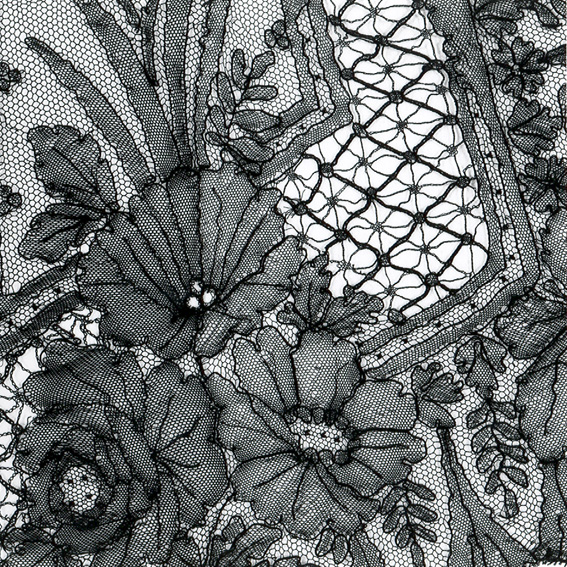 MoMu Collection T91/207. Detail van strikdas in zwarte zijde in de vorm van twee sterk uitgerokken driehoeken; motief met bloemtuilen op een raster; uitgevoerd in netslag en sierslagen op tulegrond. Go to and type in the MoMu collection number to find more information about the object.